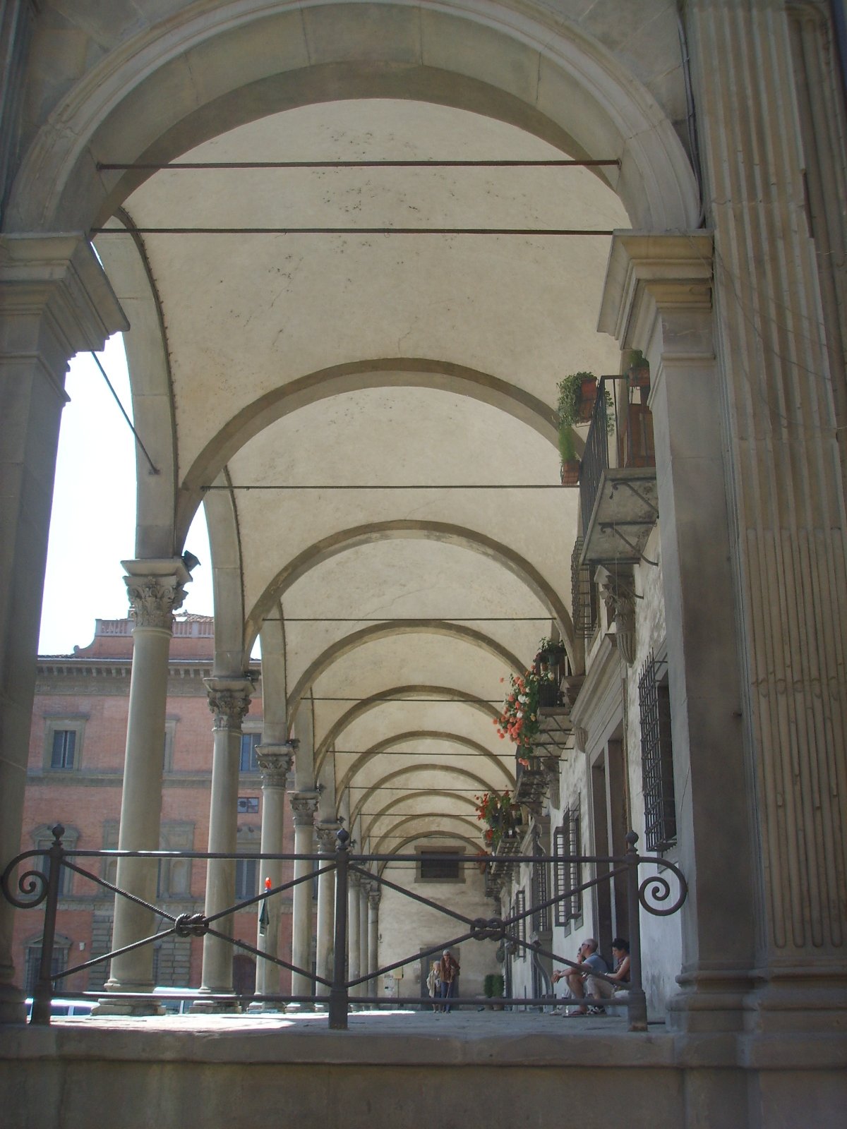 see description